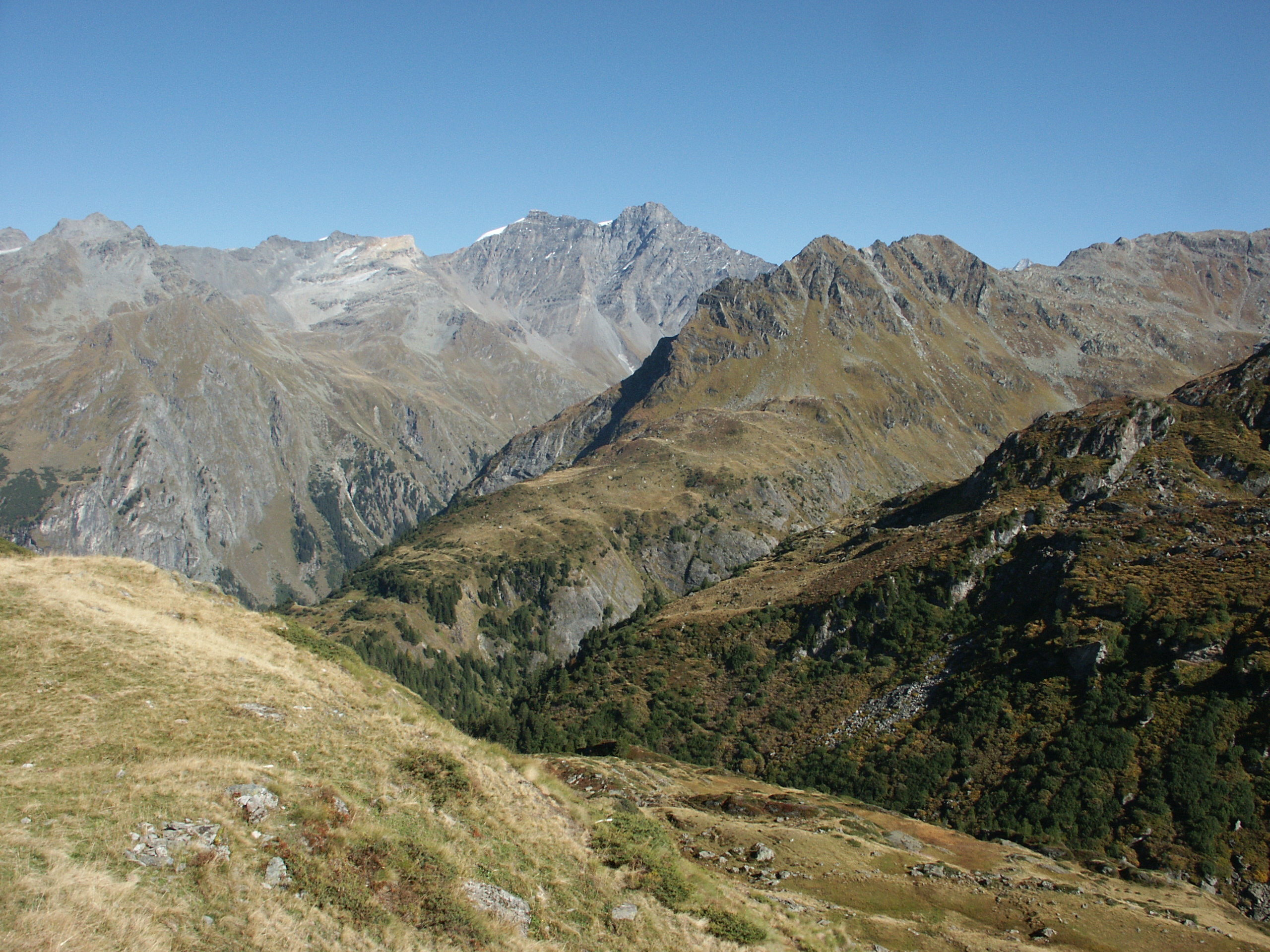 Le Parrain, Le Pleureur, Becca de Corbassière, etc., in Bagnes, Valais, Switzerland.